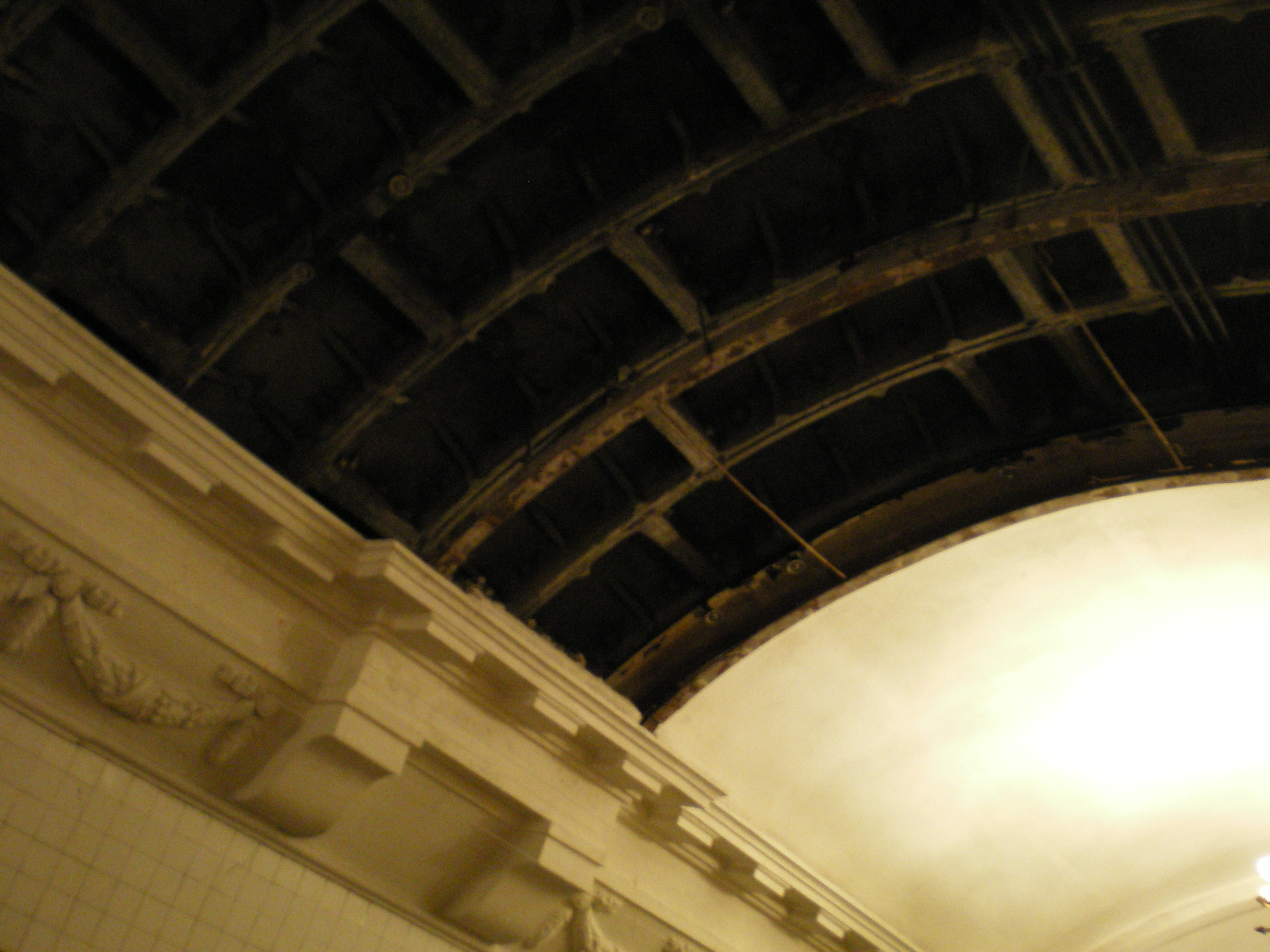 Перонный зал станции «Пушкинская», разборка потолка станции для строительства перехода